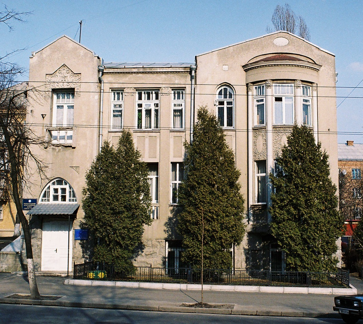 Особняк Брадтмана